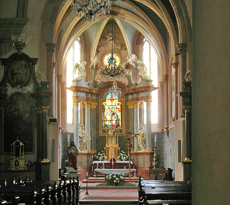 Innenraum der Franziskanerkiche, Bratislava